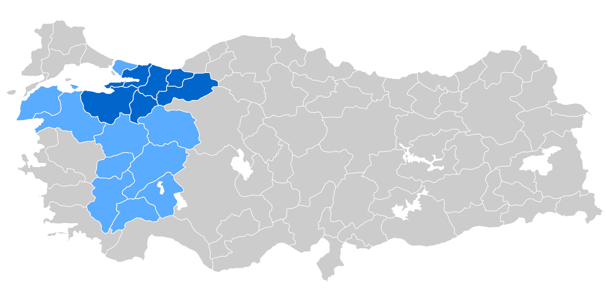 Koyu mavi Manavların yoğun olarak yaşadığı illeri,açık mavi ise belirli oranda Manav nüfusun bulunduğu illeri gösteriyor.